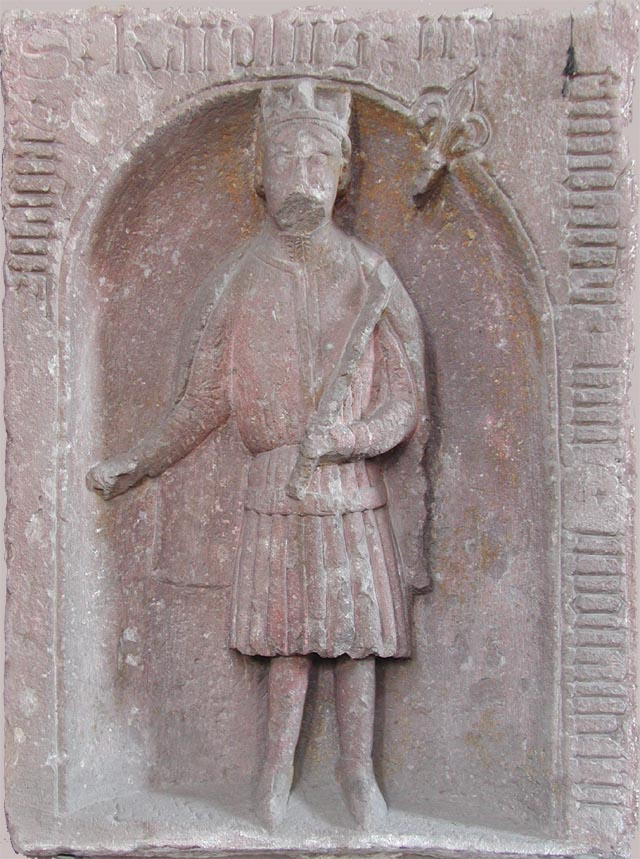 Das Steinrelief von Kaiser Karl dem Großen, um 1400, befindet sich in der ehemaligen Klosterkirche der Benediktiner in Neustadt am Main.